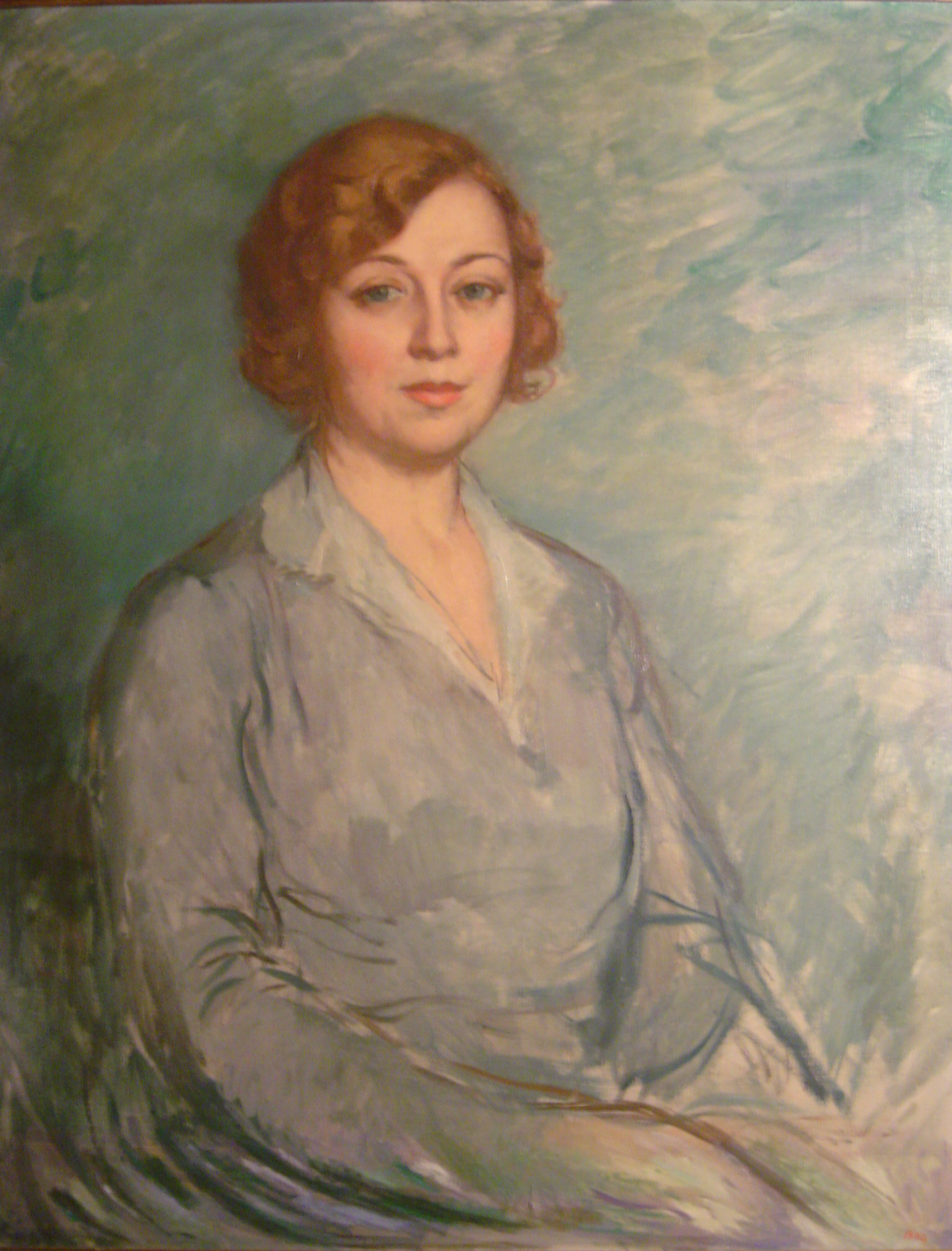 Retrat de la Senyora Victòria Gonzàlez només té acabada completament la cara, la resta és només un esboç. Ulls blaus, cabell ros i vestit blau. Fons del típic color blau-verd de Canals.